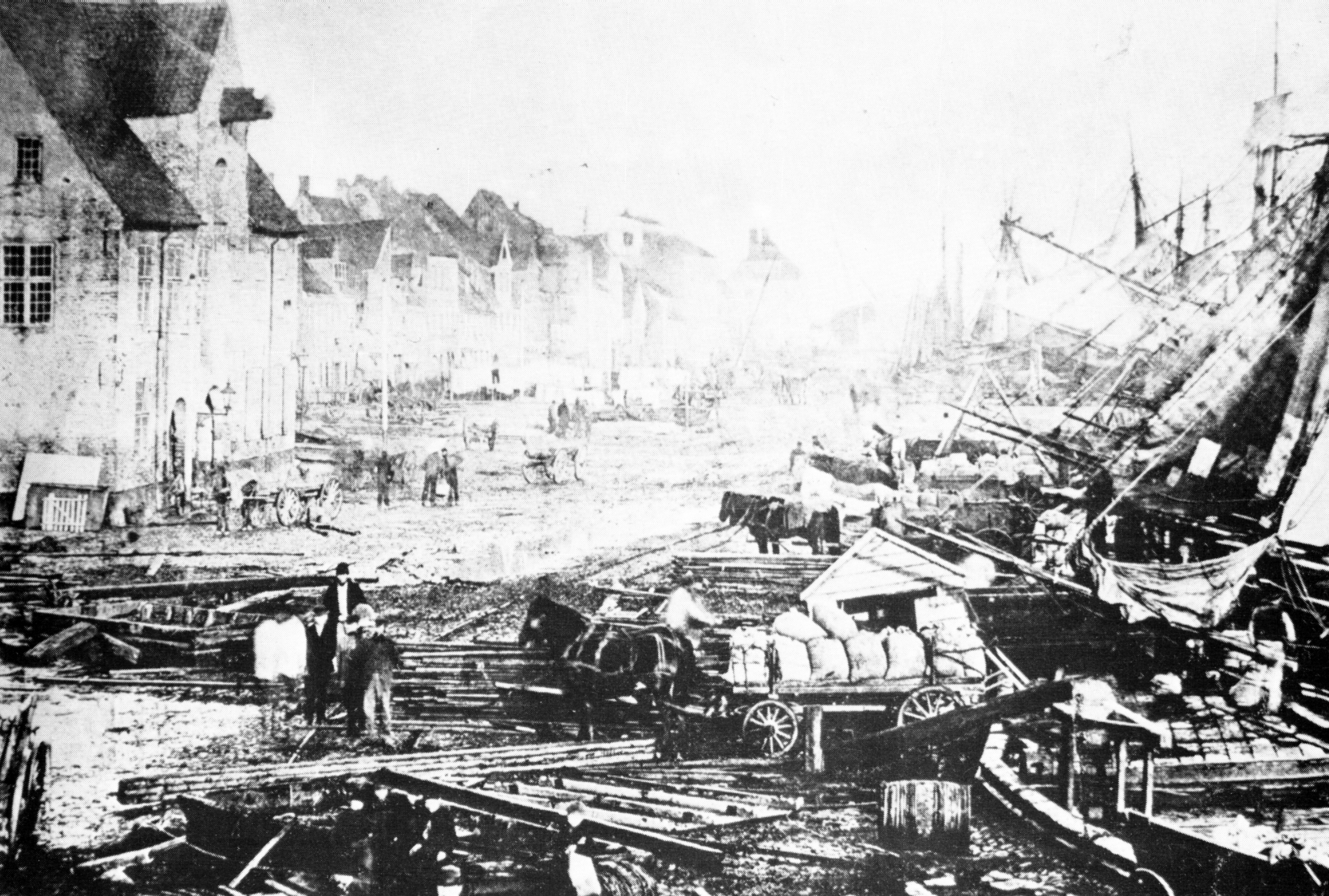 Der verwüstete Flensburger Hafen nach dem Ostseesturmhochwasser am 13. November 1872